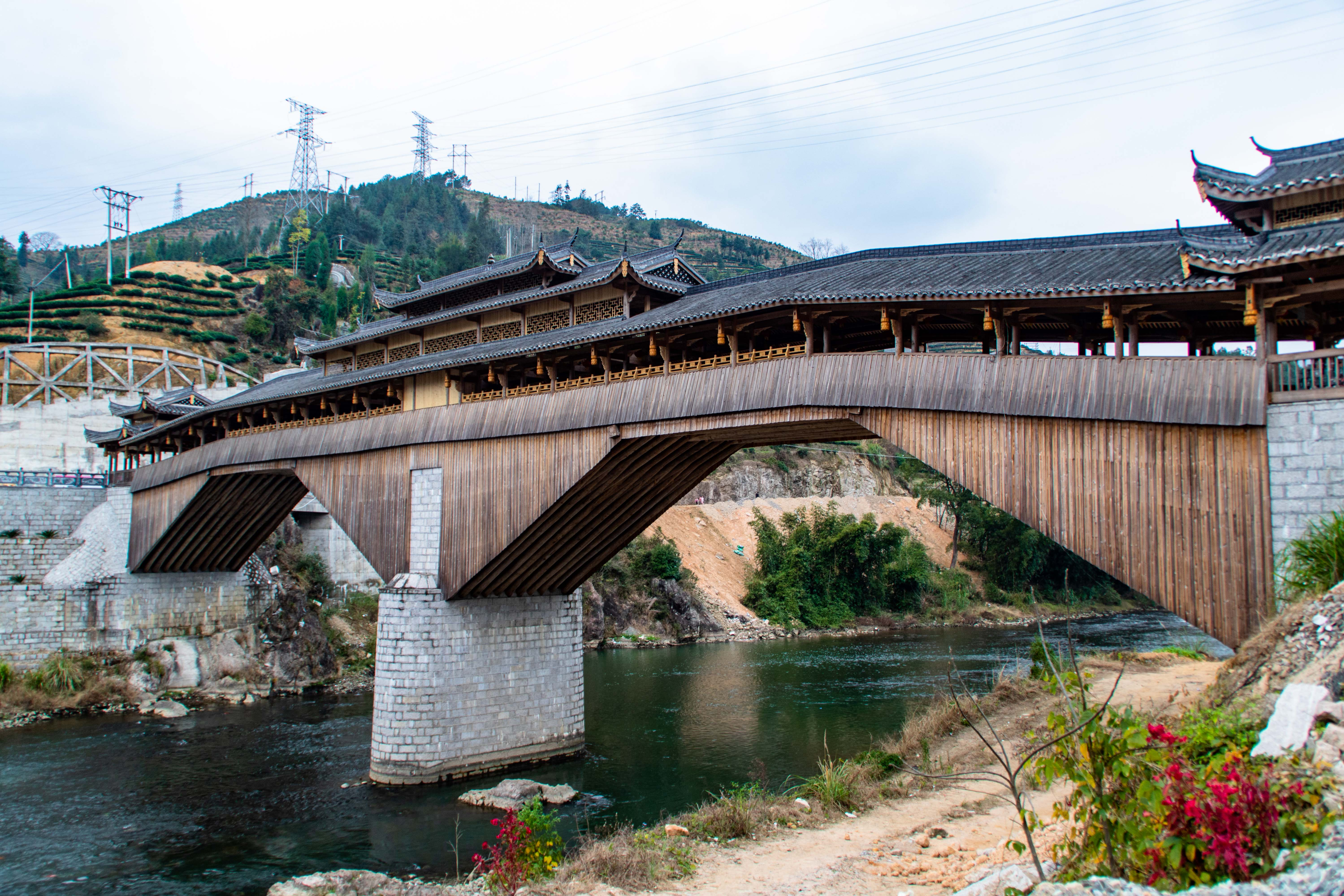 中文（中国大陆）: 位于寿宁县斜滩镇的一处廊桥